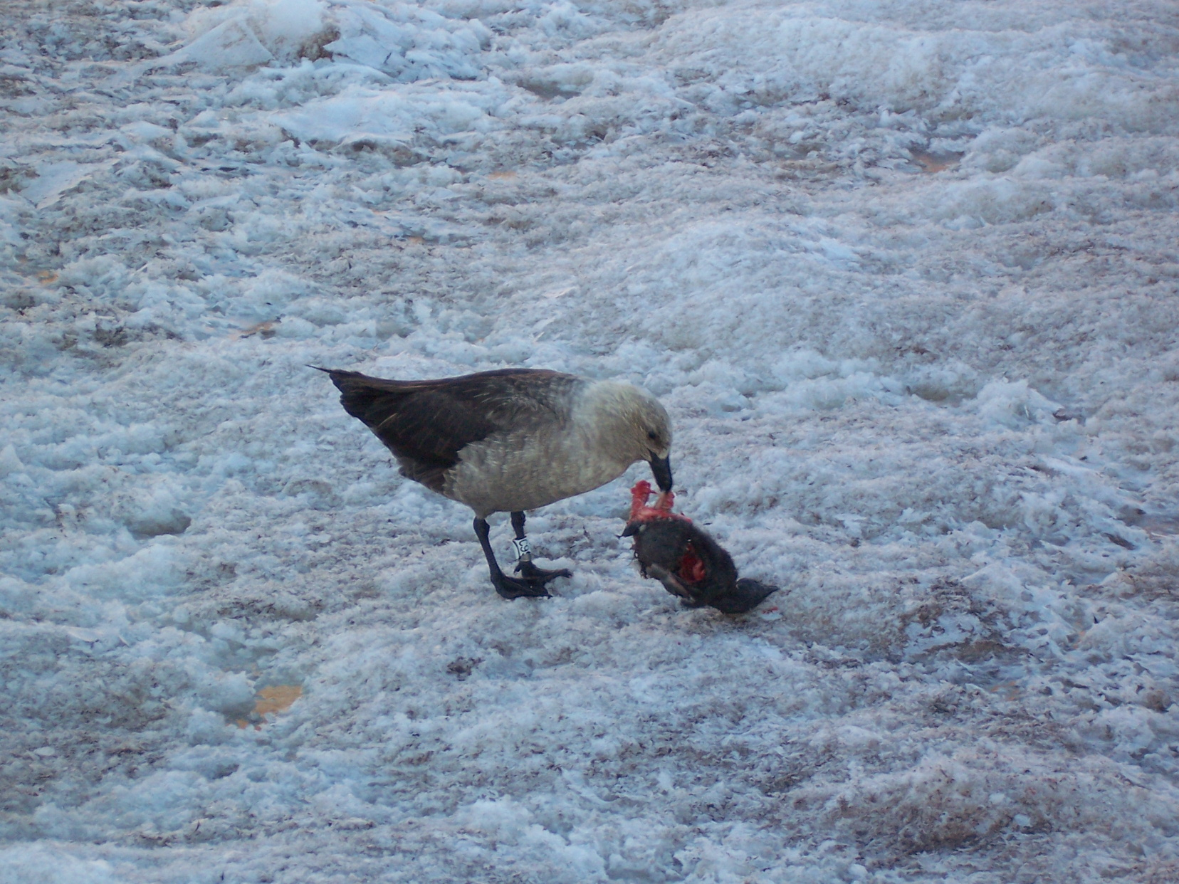 Skua se nourrissant d'une carcasse de poussin manchot Adélie. Photo prise à coté de la base Française Dumont d'Urville en Antarctique.